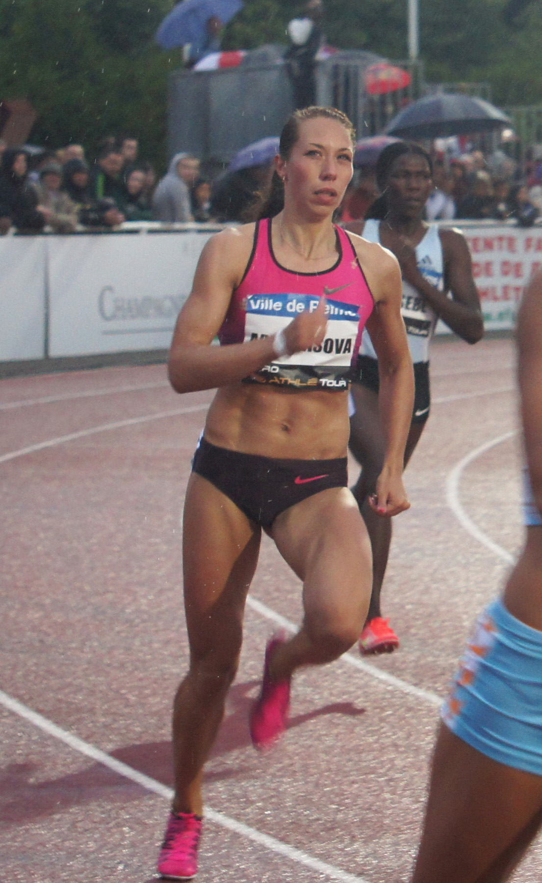 Maryna Arzamasava lors des Rencontres d'athlétisme de Reims 2013 .